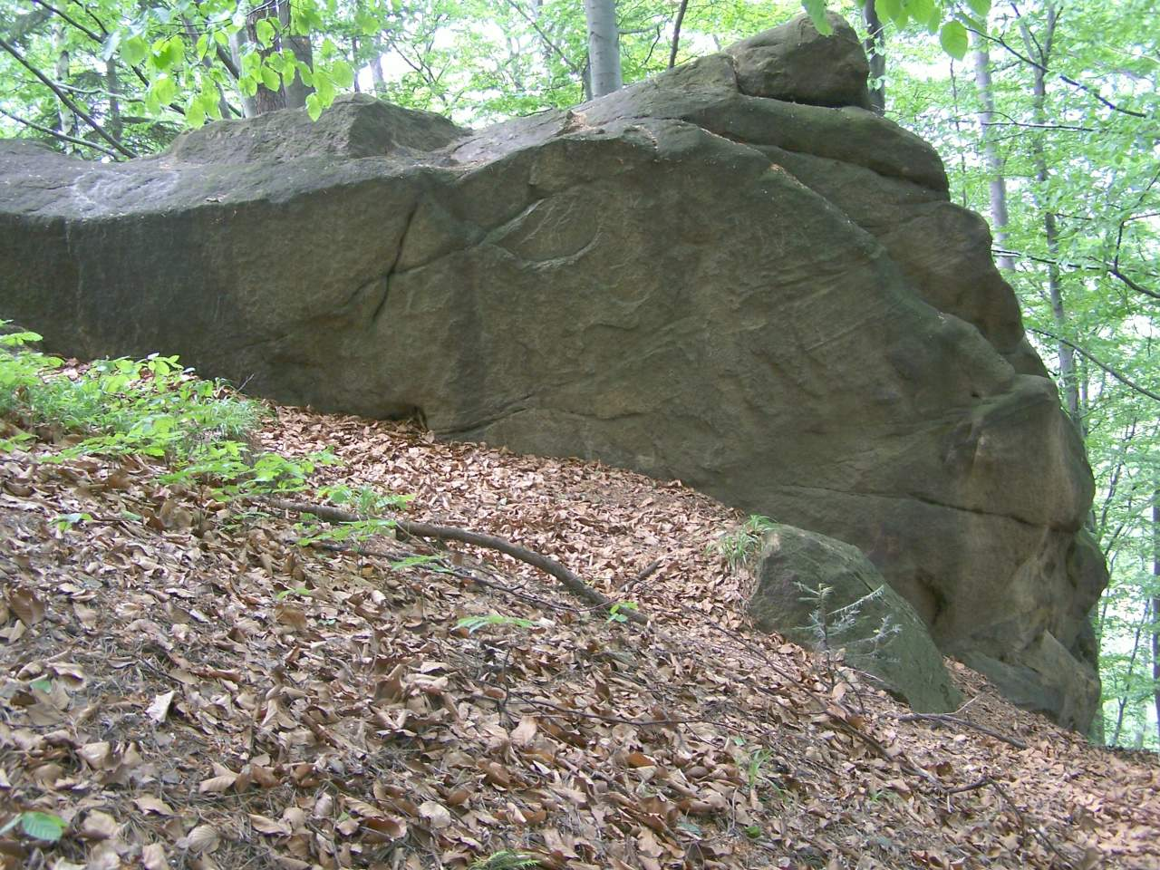 Trzciana (województwo małopolskie)- ostaniec skalny na granicy Trzciany z Cichawką